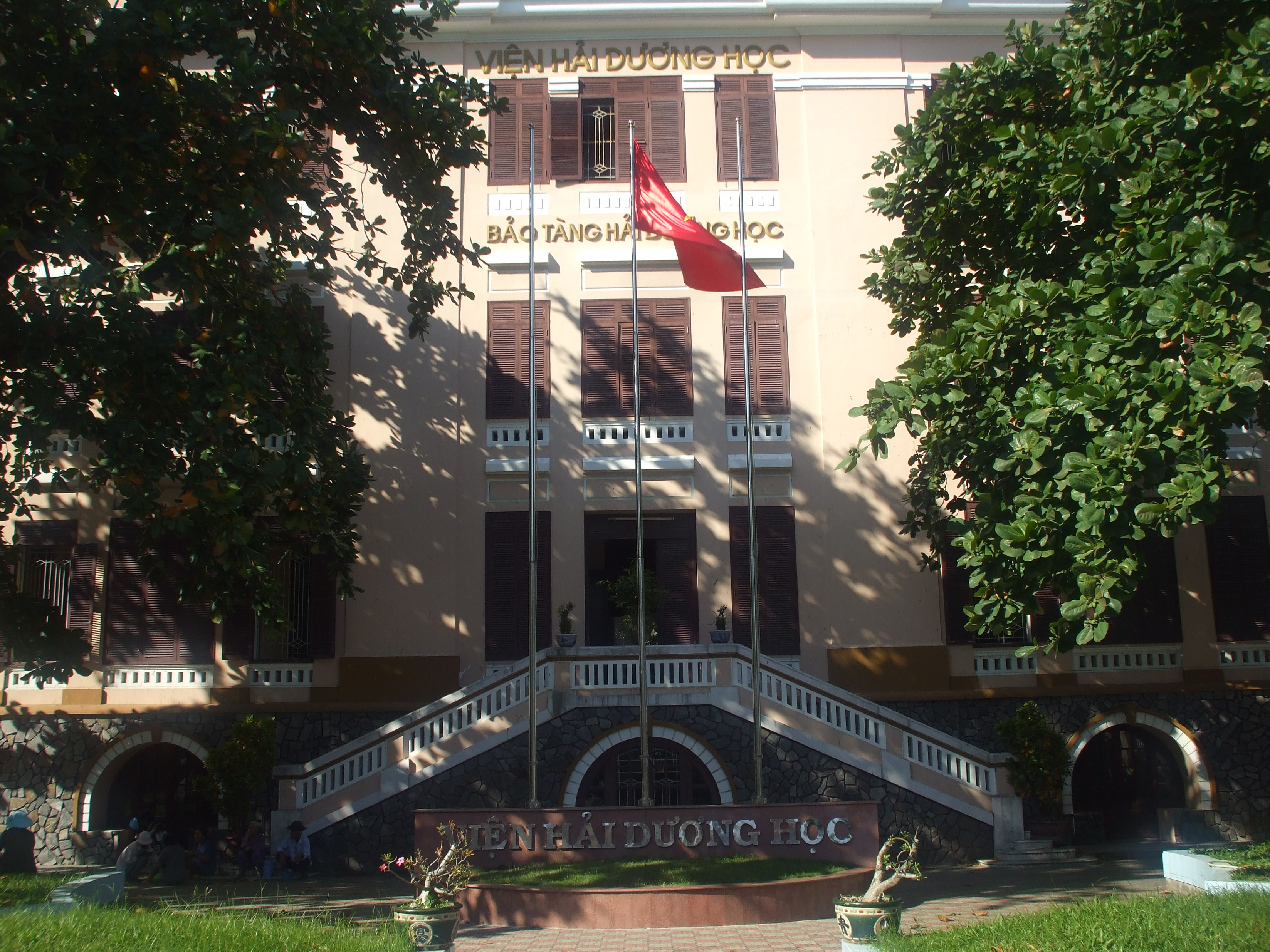 Tòa nhà chính thuộc Viện Hải dương học Nha Trang (Việt Nam).